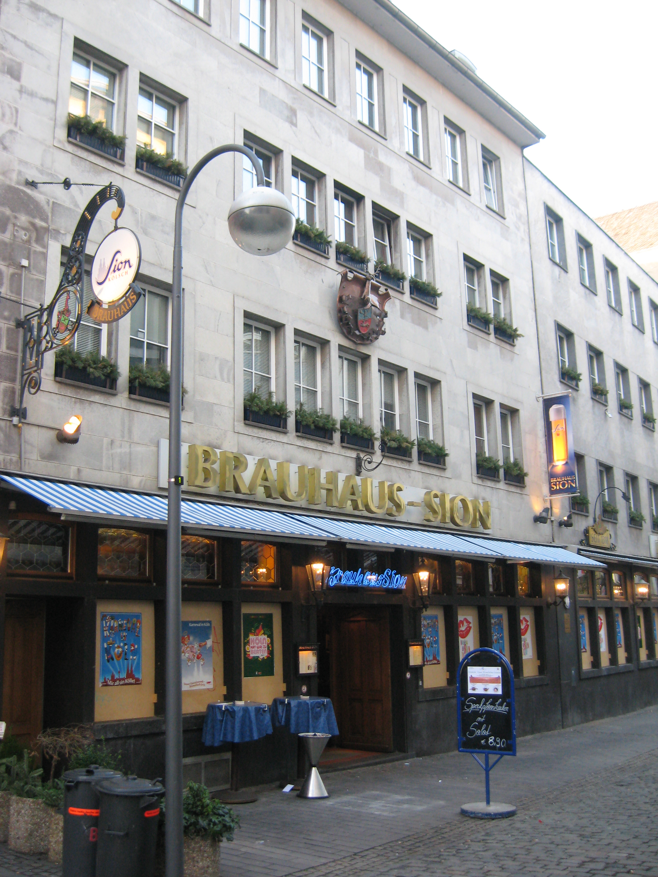 Brauhaus Sion, Frontansicht, Köln, (Alter Markt) Datum: 02.03.2011 Urheber M. Pfeiffer alias Benutzer:Gordito1869 Quelle: privates Fotoarchiv des Urhebers